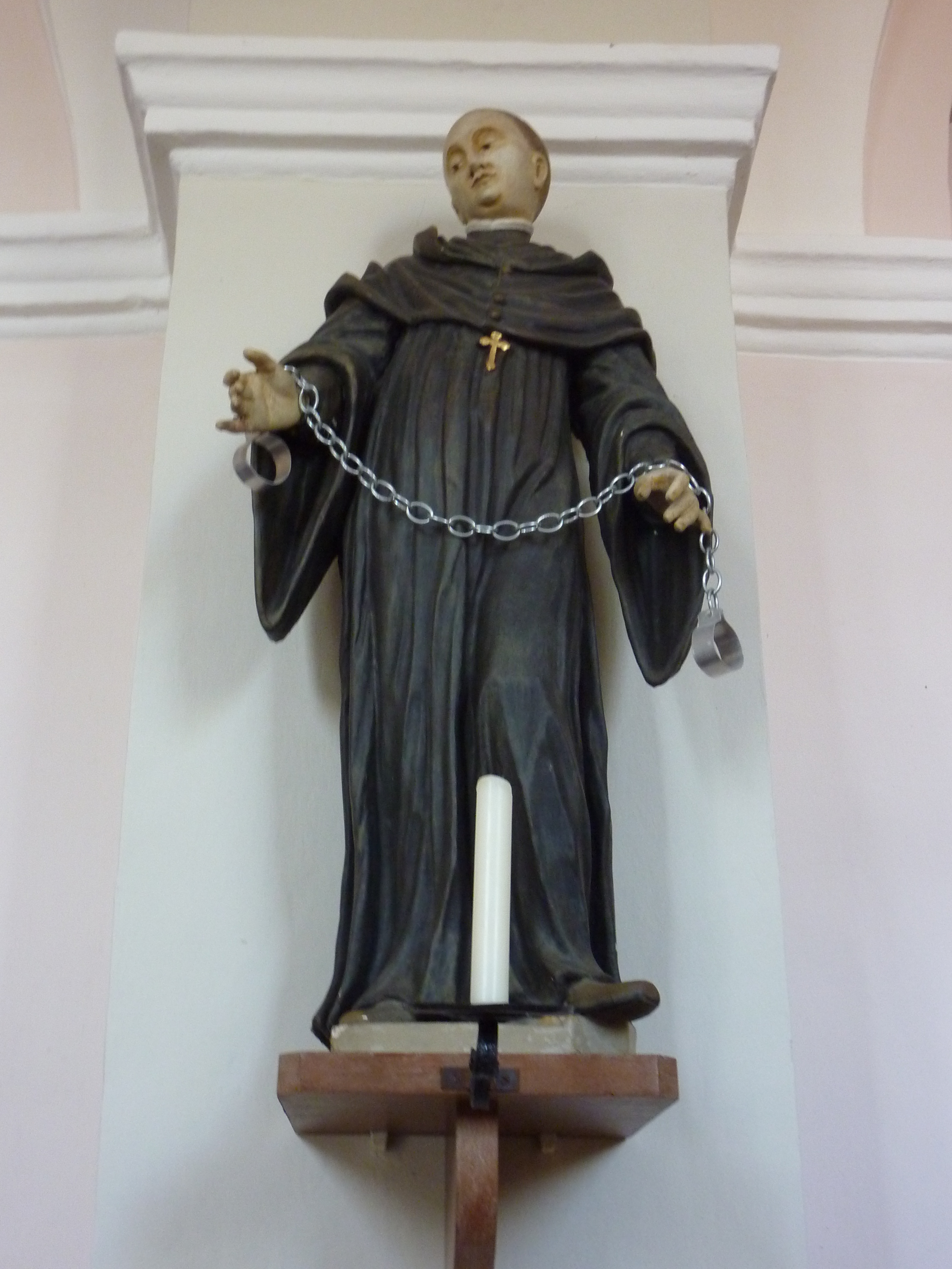 Pfarrkirche hl. Laurentius, Unternalb, Niederösterreich - Statue hl. Leonhard im linken Seitenschiff